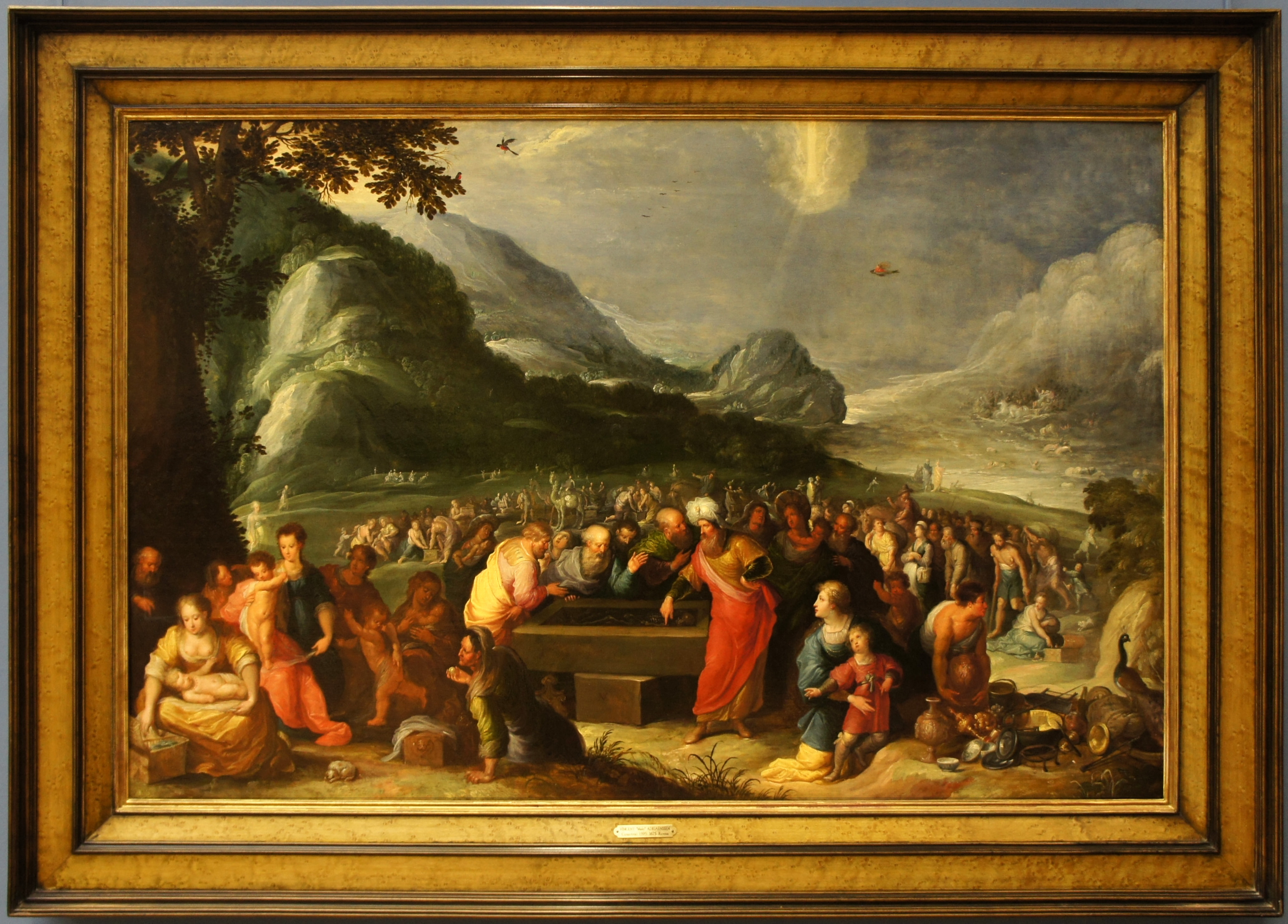 Peinture au Musée des beaux-arts et d'archéologie de Châlons-en-Champagne. 72,5 par 101cm avec le cadre.